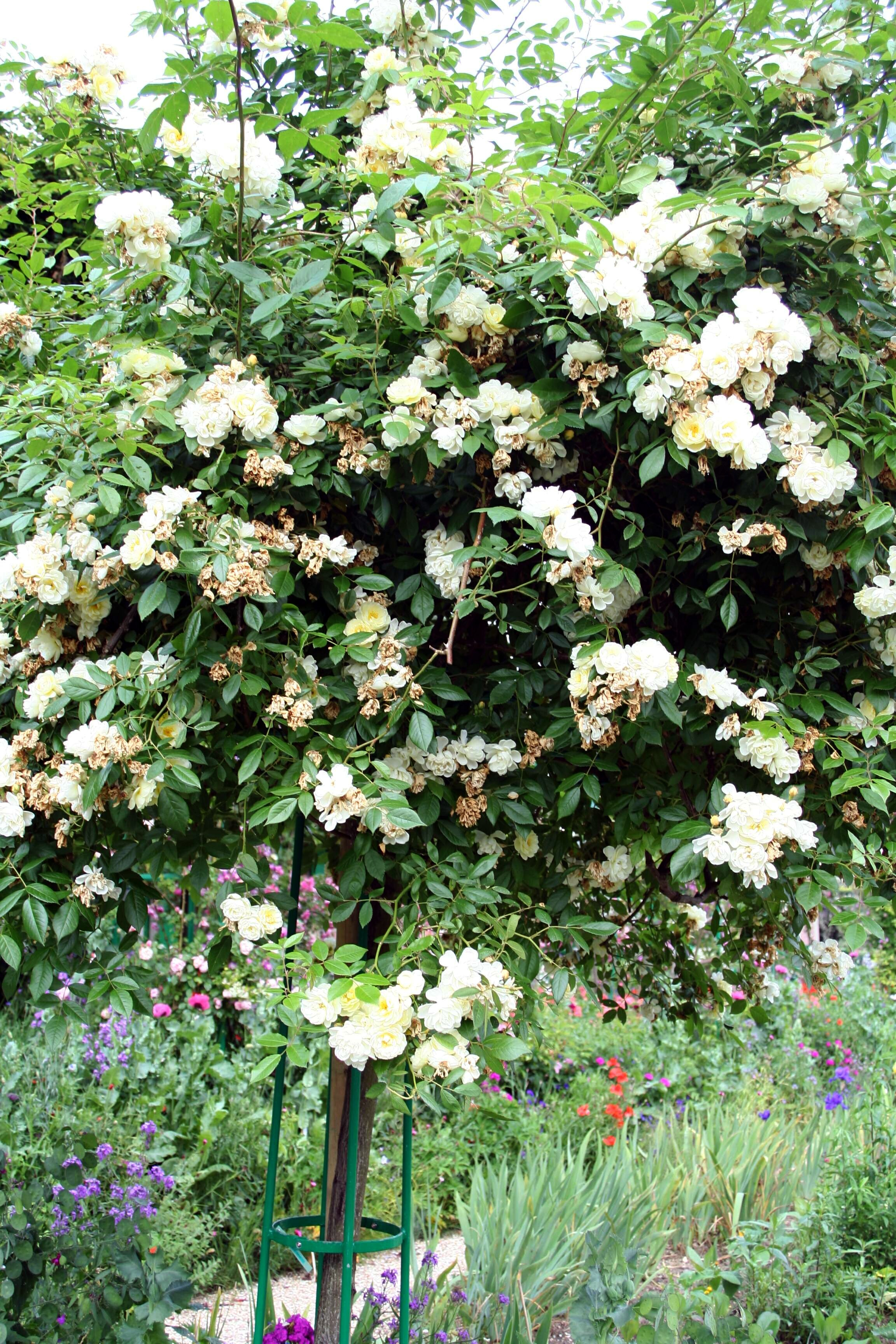 Rosa 'Aviateur Blériot' photographiée dans le jardin de Claude Monet à Giverny - Eure (France)